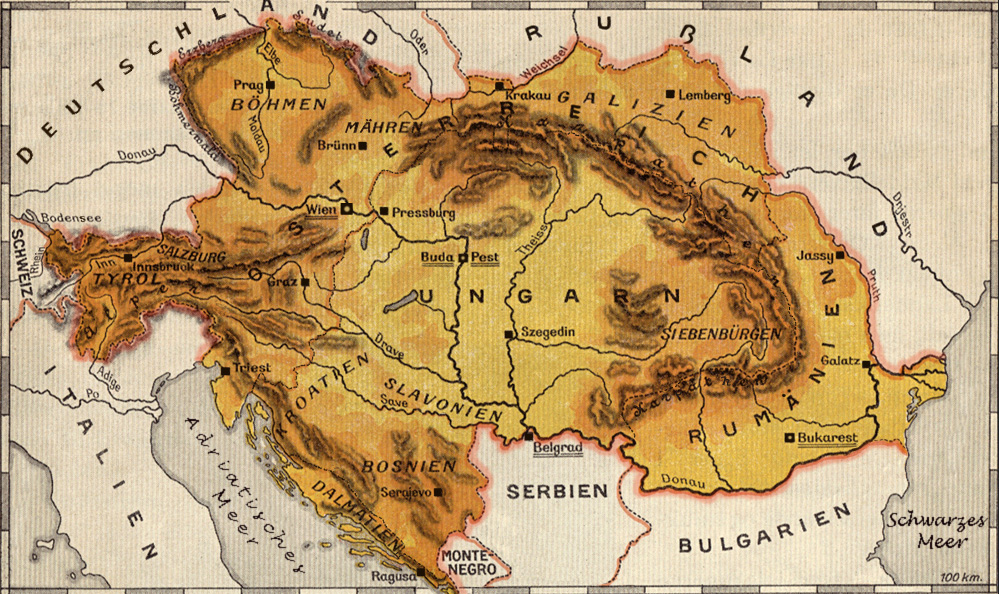 Österreichische Militärvorschlag für d. Vertrag von Bukarest (1918) nach [1] und Fritz Fischer, Griff nach der Weltmacht, 1970 : Österreich, Ungarn und Rumänien vereint unter dem Zepter der Habsburger.